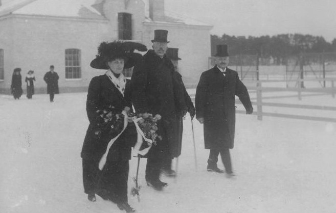 Gustav V invigde den 31 januari 1912 Stockholms första offentliga slakthus. På bilden är konungen i sällskap med prinsessan Ingeborg, ordförande och grosshandlaren C. O. L Rosengrén samt direktör Martin Sandeborg.